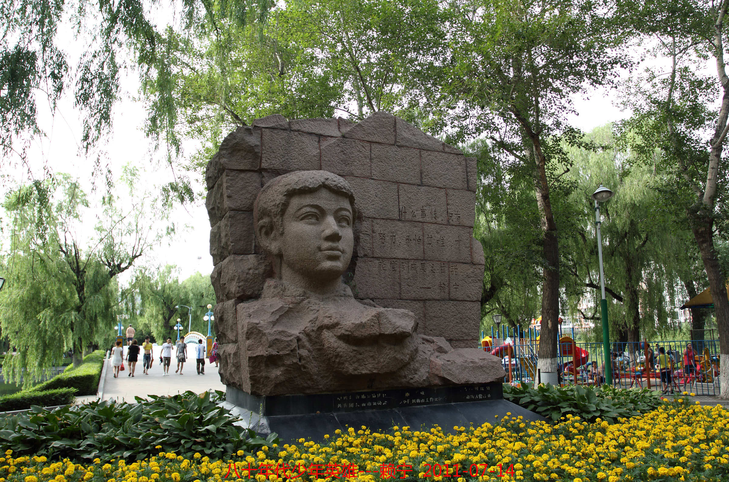 八十年代少年英雄赖宁 Lai Ning